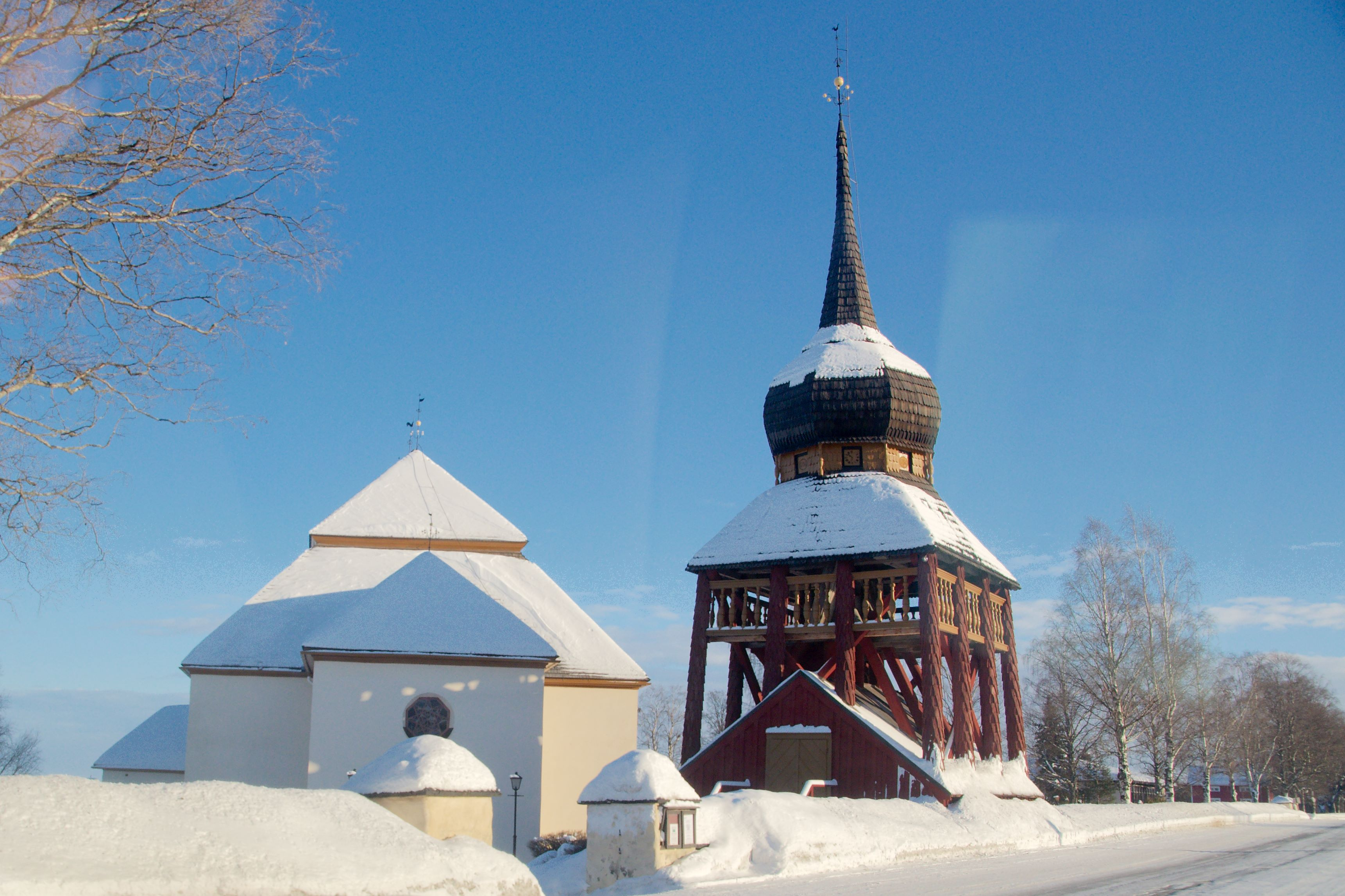 Hallens kyrka